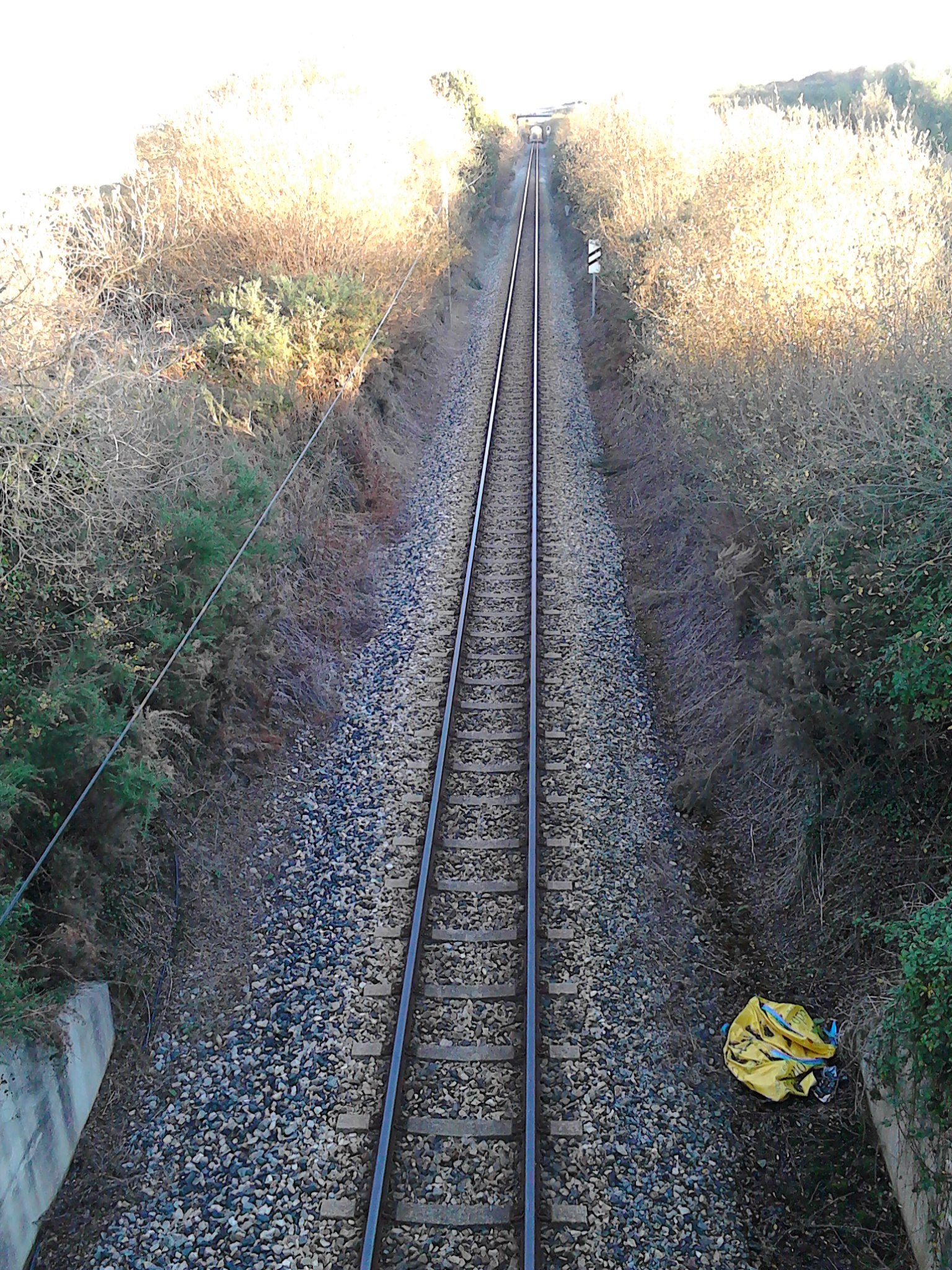 Vía do ferrocarril Ferrol-Xixón preto de Ribadeo